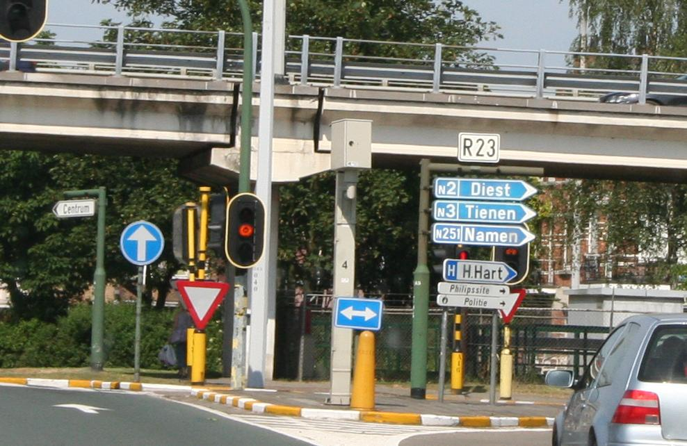 Photo du Ring de Louvain depuis la RN 264.